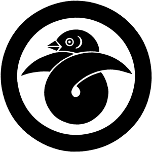 丸に結び雁金